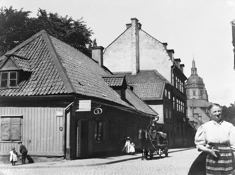 Södermannagatan 10-12, Södermalm, Stockholm, 1885-1914, SSM